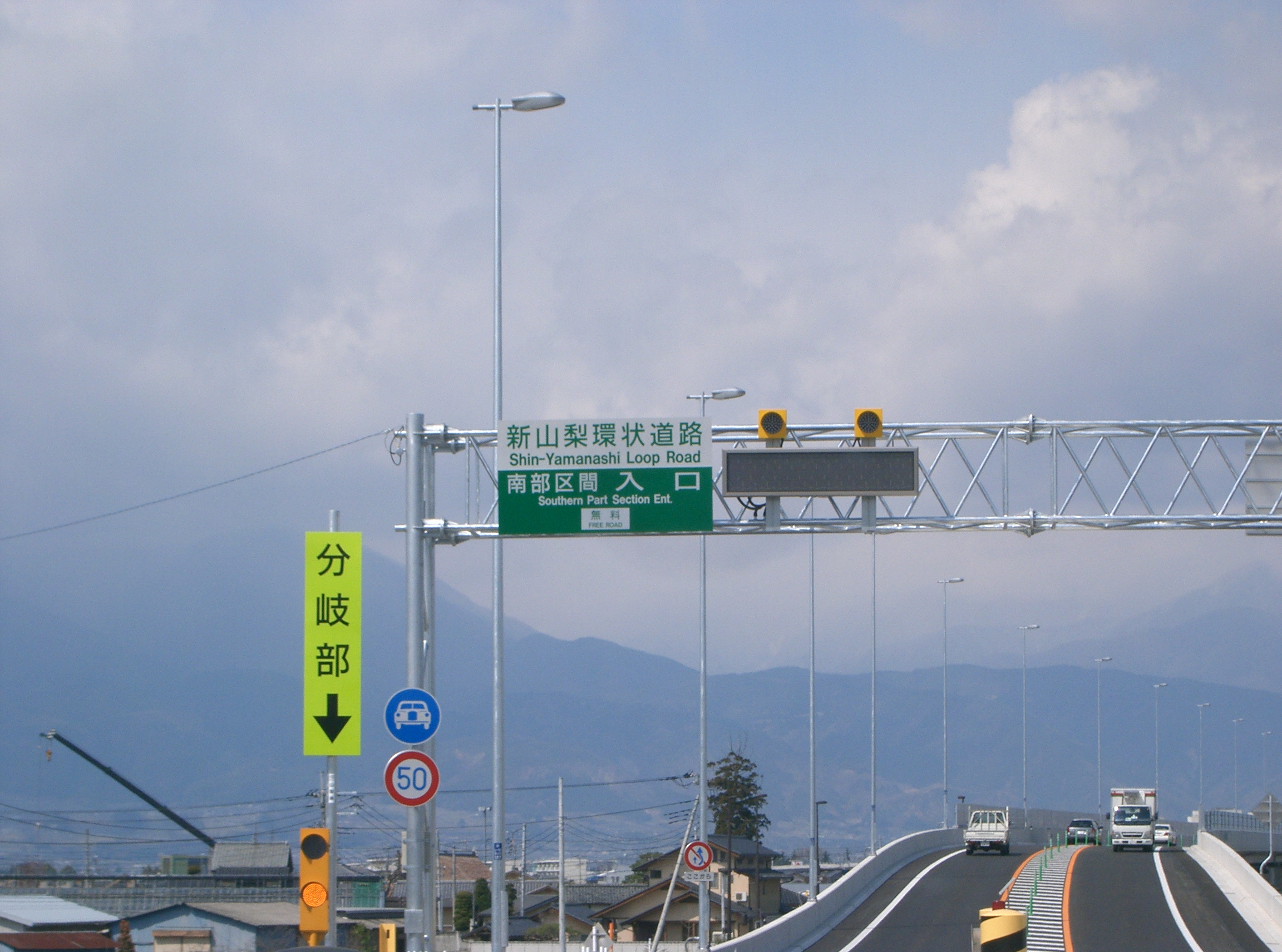 新山梨環状道路南部区間 外廻り玉穂東ランプ